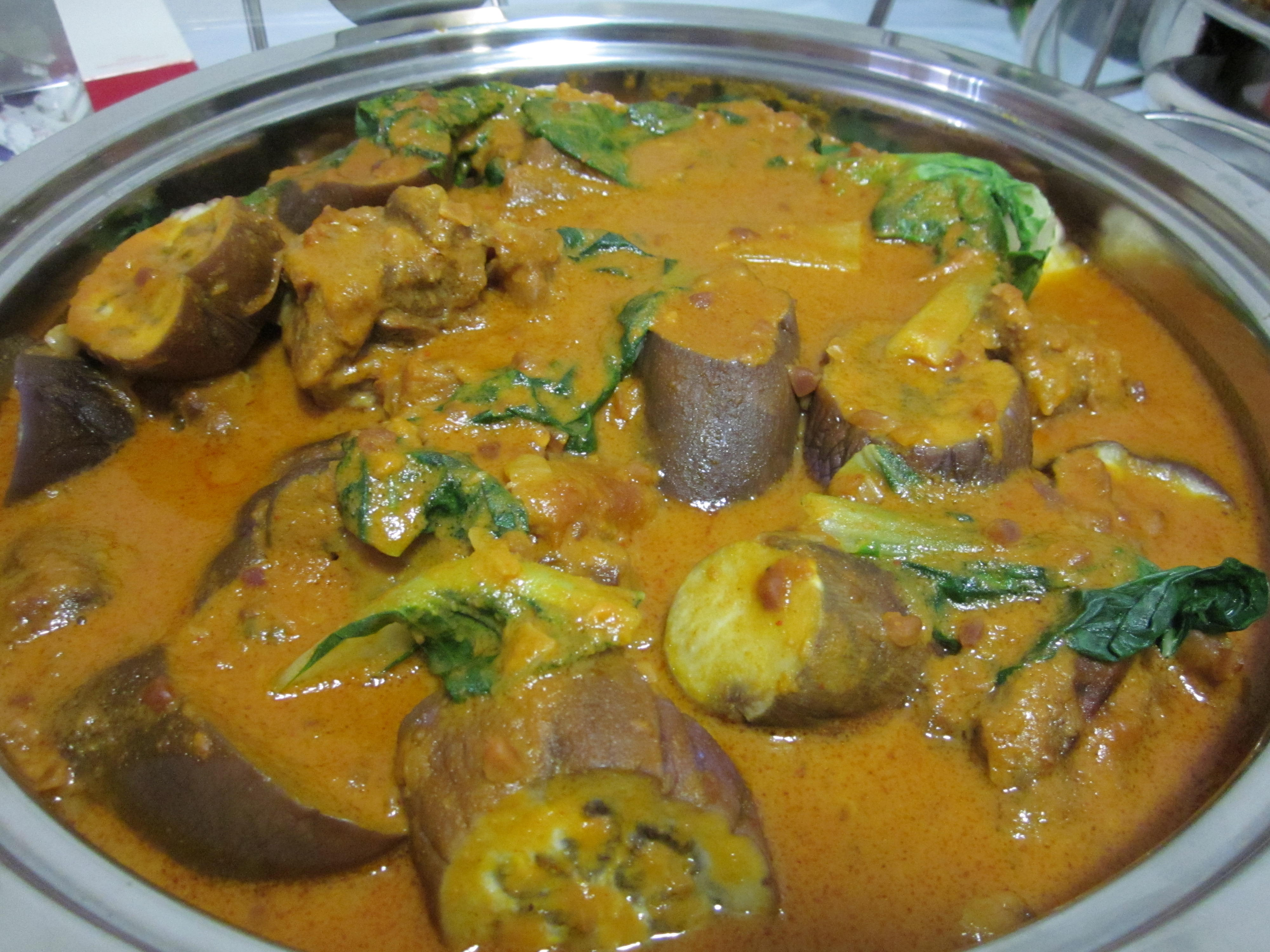 Kare-Kare